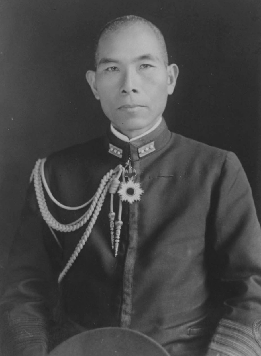 Japanese Admiral Takagi Sokichi